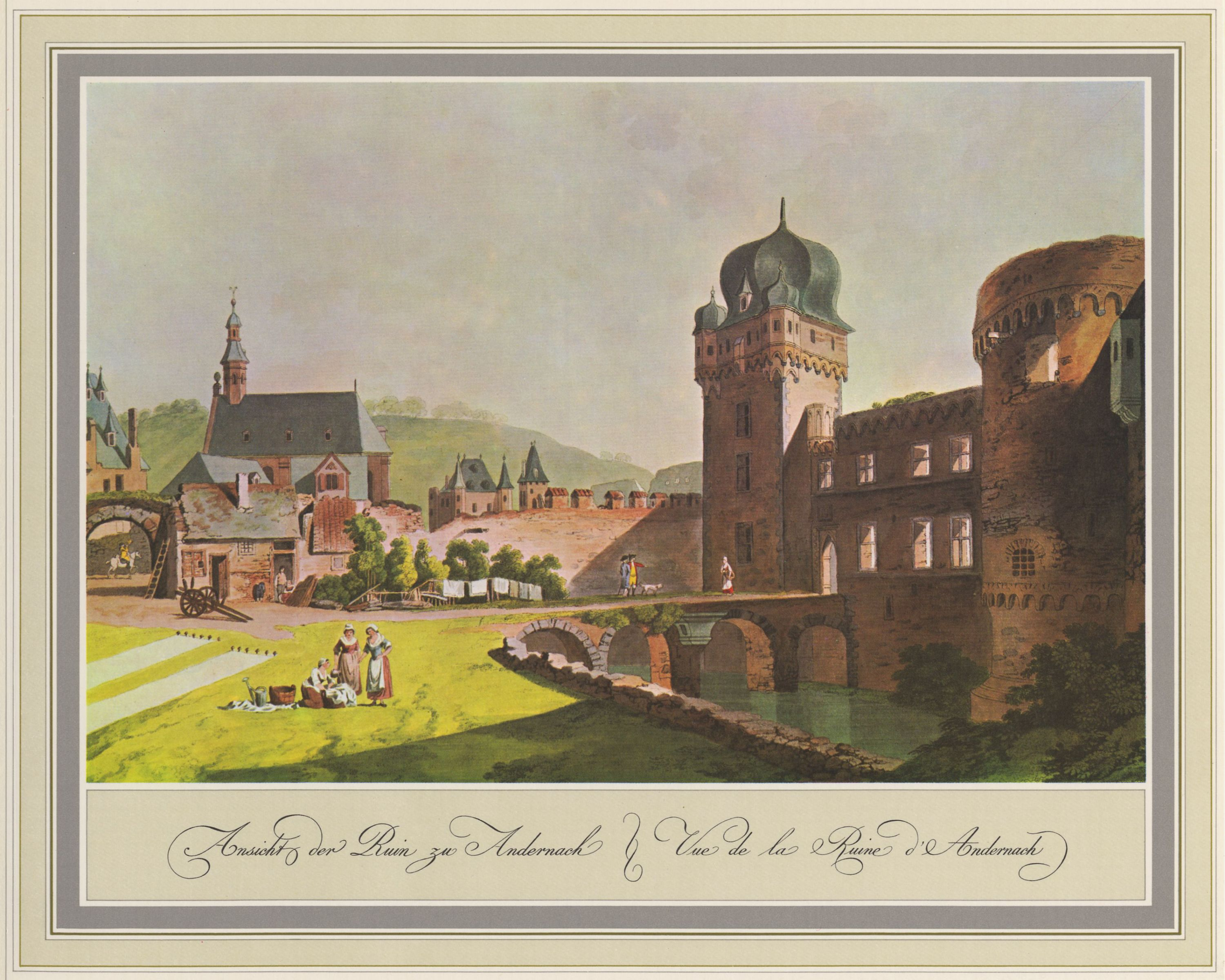 Andernach, Andernach Stadtburgruinen von Süden; Kupferstich, aquarelliert, aus: »Fünfzig malerische Ansichten Rhein-Stroms von Speyer bis Düsseldorf«, erschienen bei Artaria in Wien 1798; nach Aquarellen von Laurenz Janscha, die im Sommer 1792 entstanden